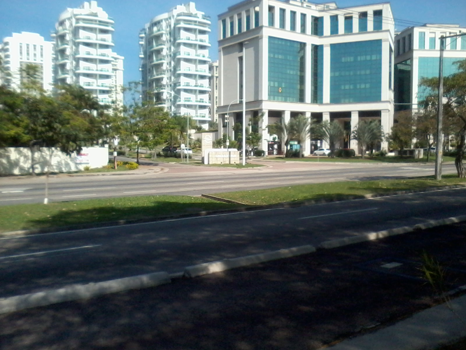 Condomínio Américas Park, visto do canteiro central da Avenida das Américas